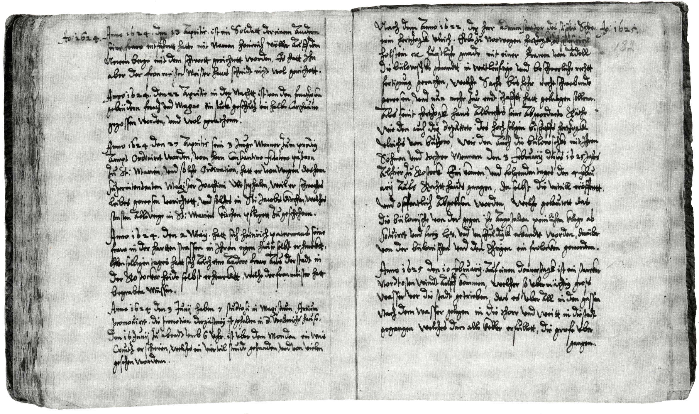 Abbildung der Rostocker Chronik des Vicke Schorler